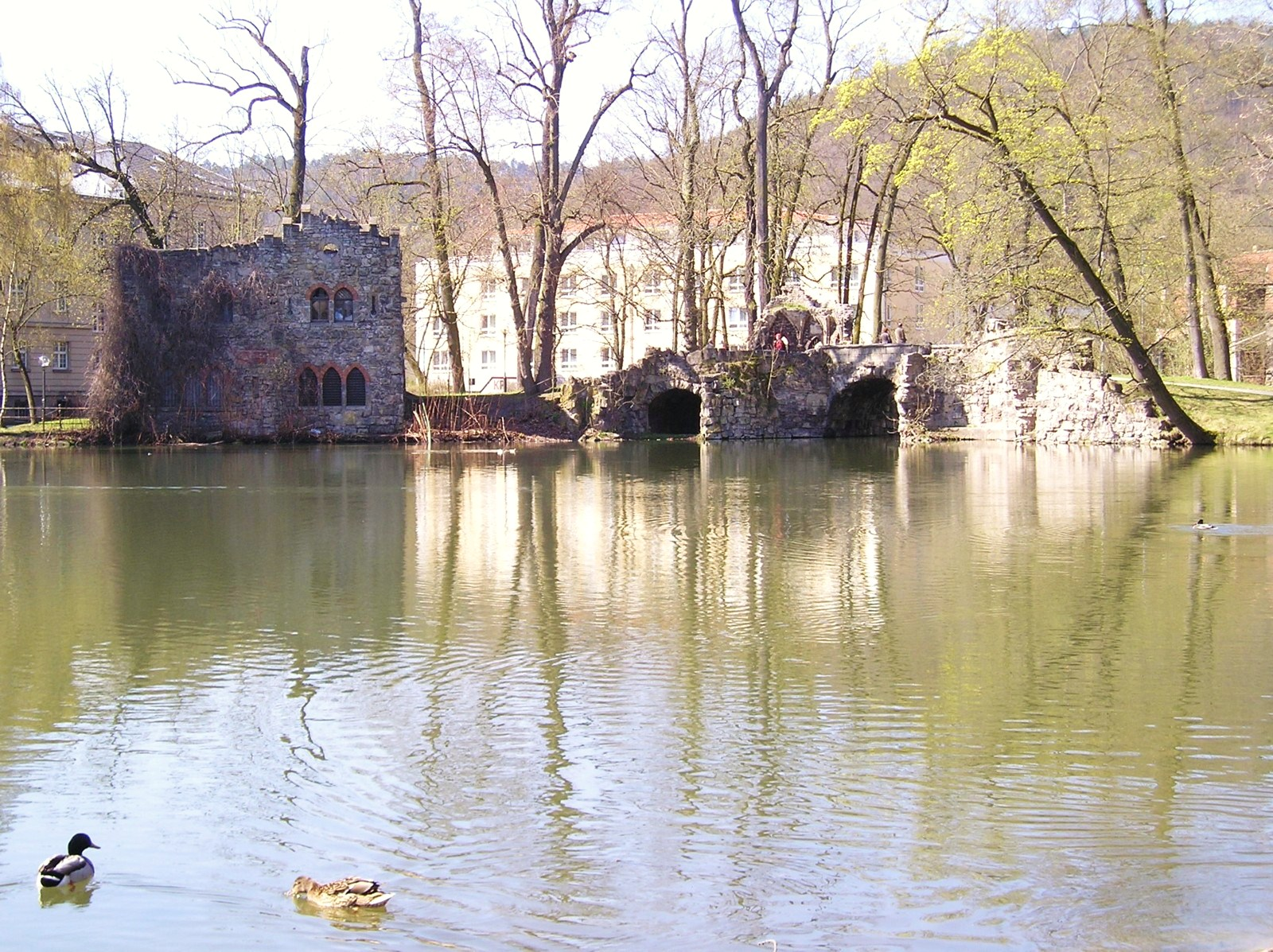 Künstliche Ruinen von 1795 im Englischen Garten in Meiningen